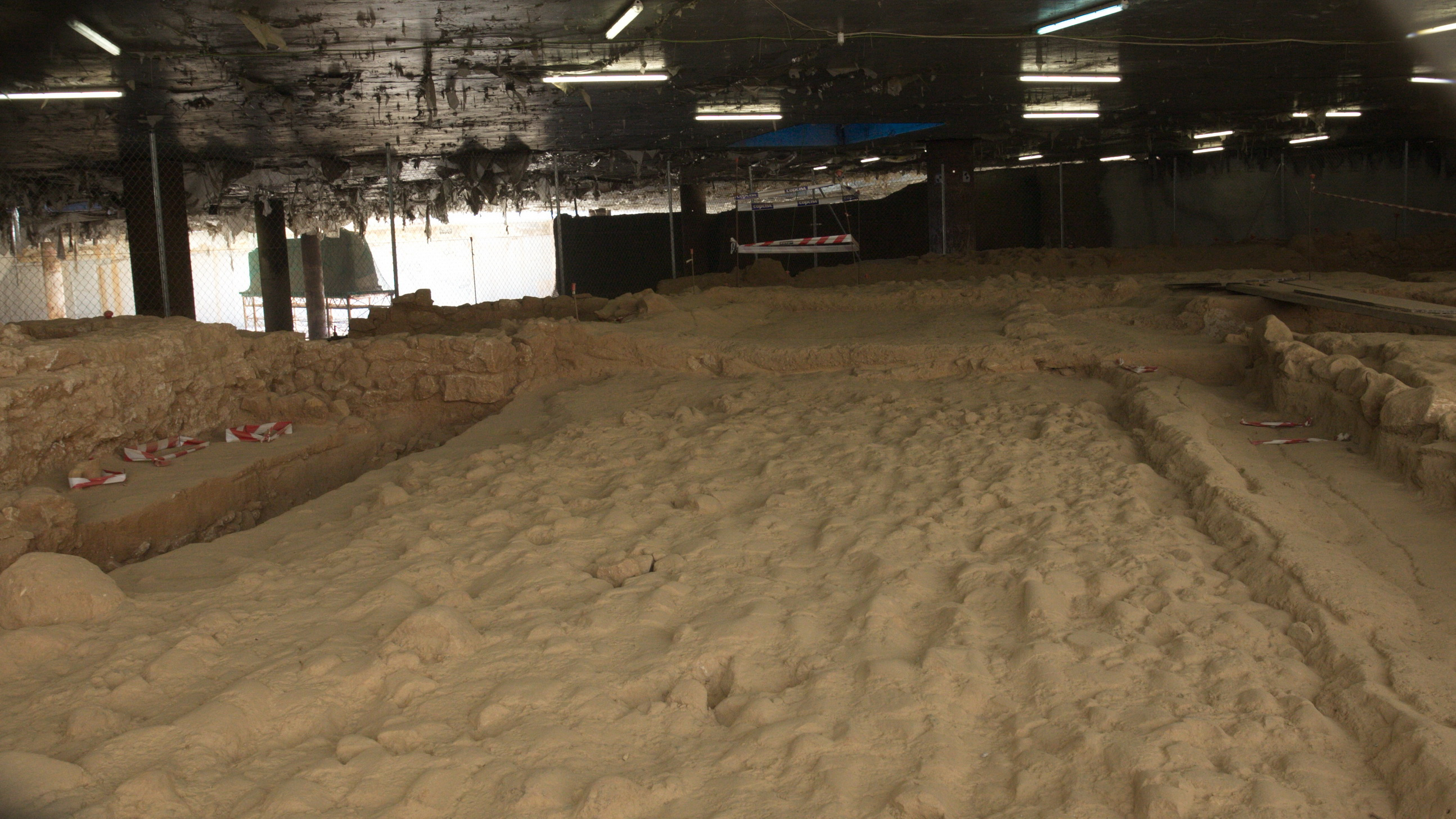 Mercat de Sant Antoni (Barcelona, 1879). Tram de via romana descobert durant les obres de remodelació.